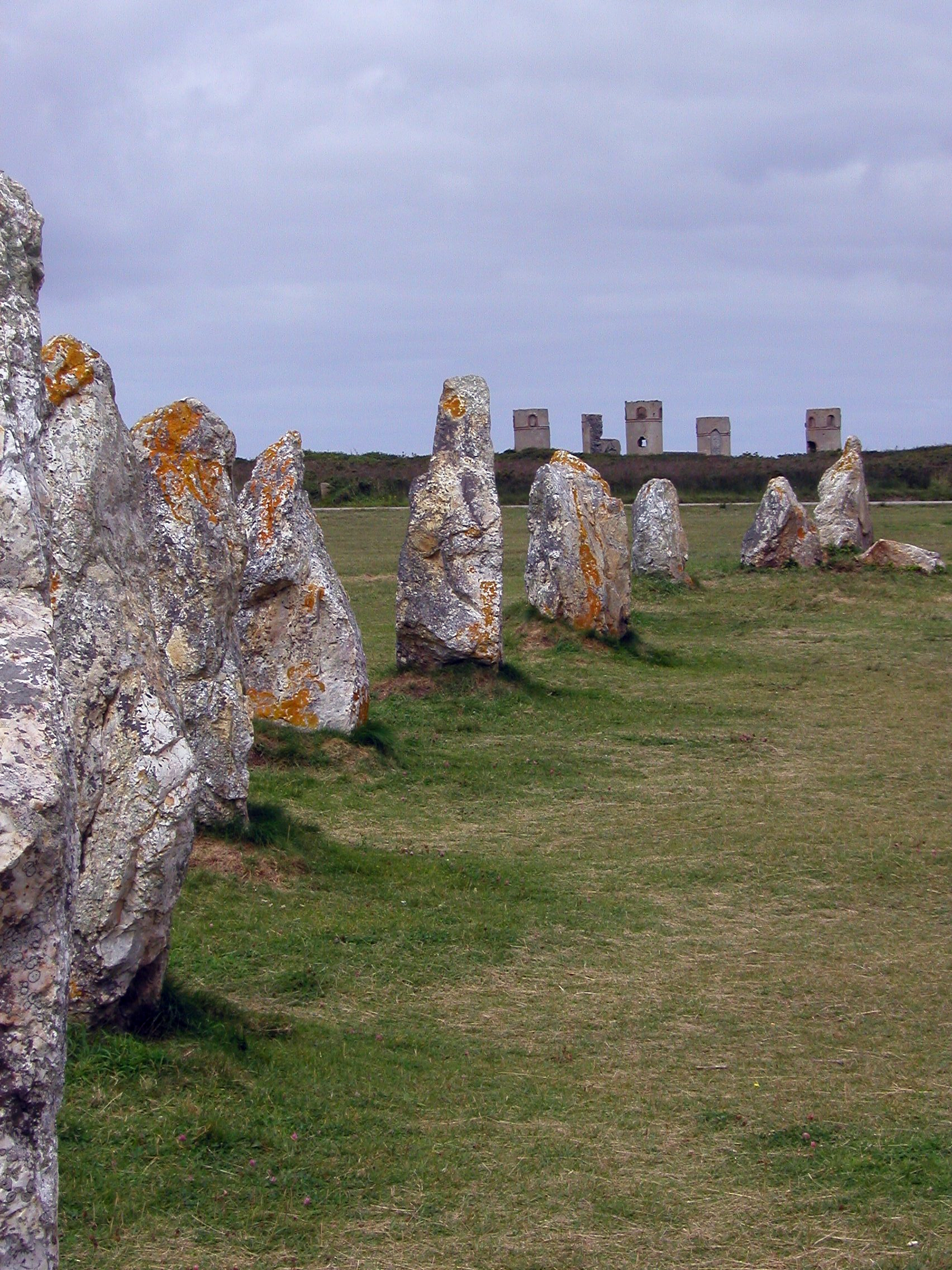 Alignement von Lagatjar bei Canaret-sur-Mer